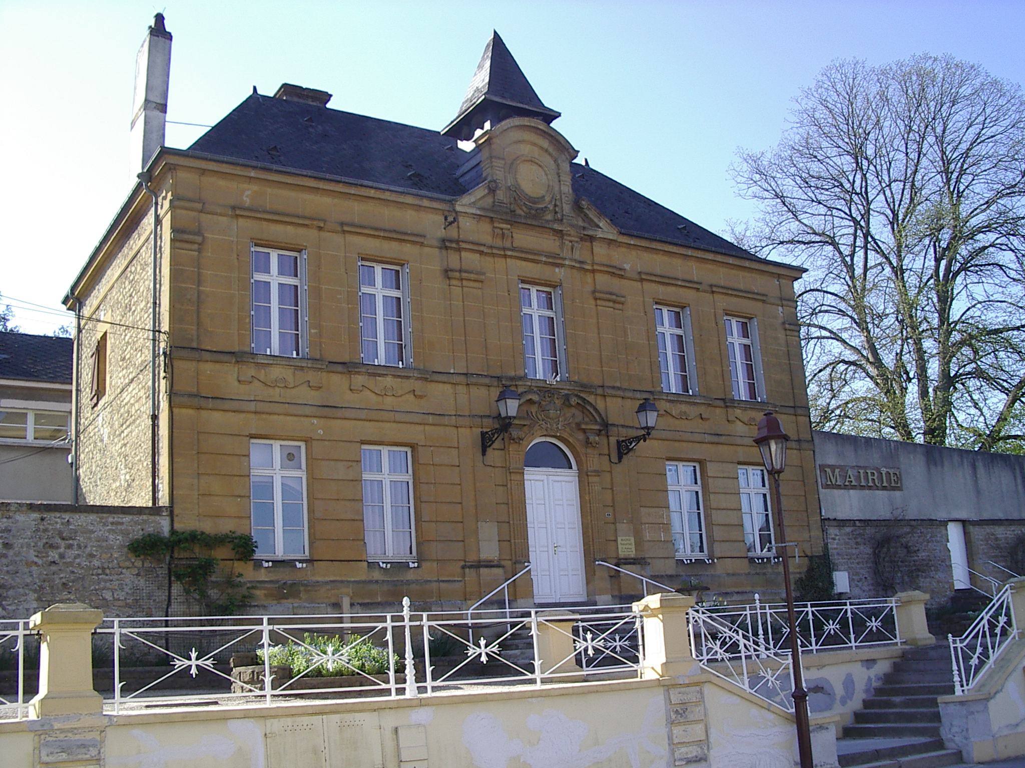 Vrigne-au-Bois Ancienne Mairie